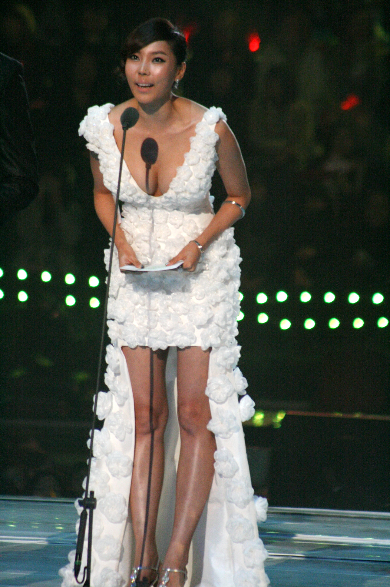 2009 엠넷 아시안 뮤직 어워드